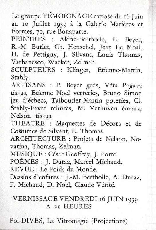 Invitation pour une exposition du groupe Témoignage à Paris en 1939